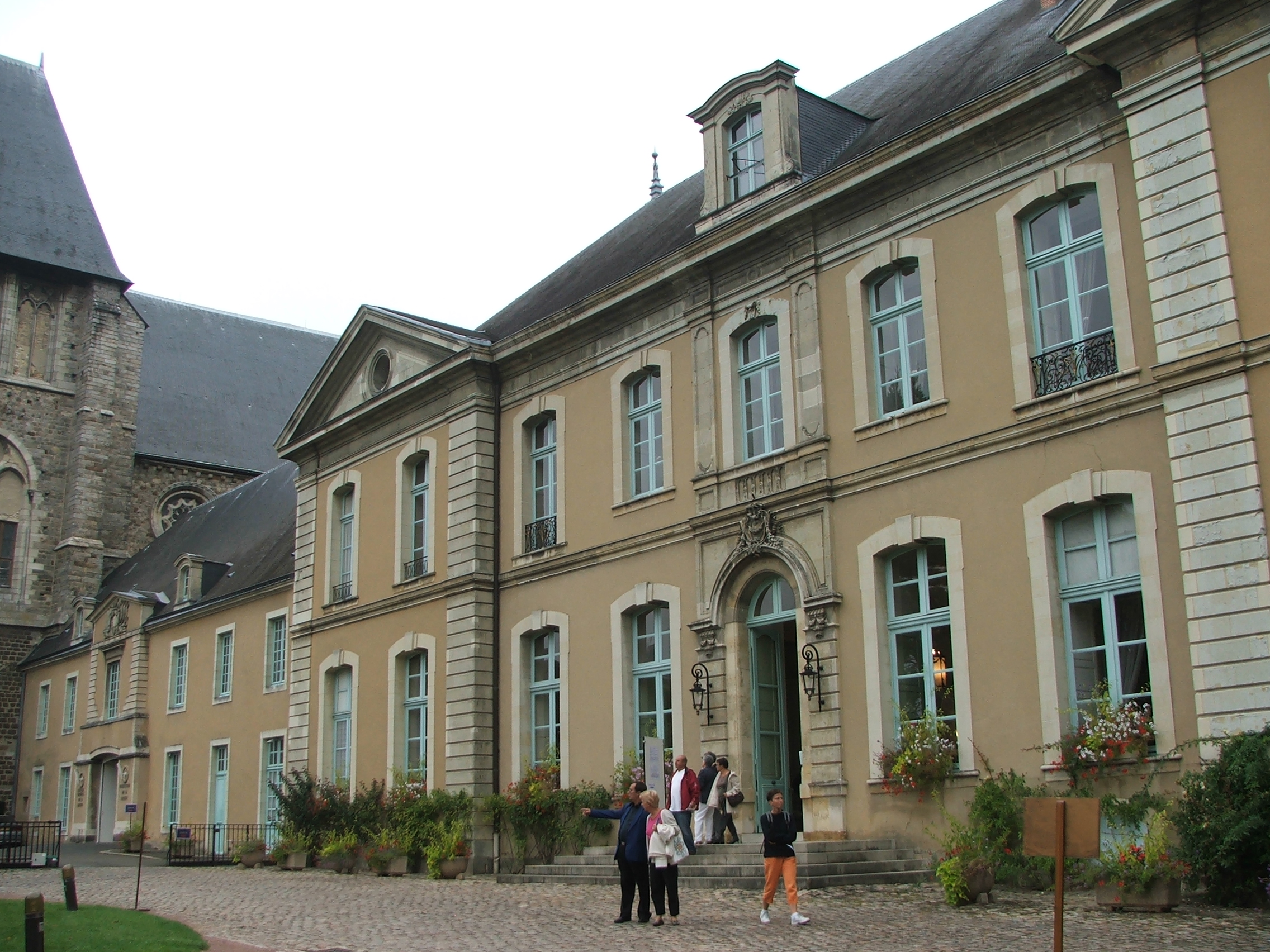 L'ancienne Abbaye Saint-Pierre de la Couture, actuelle préfecture de la Sarthe au Mans.